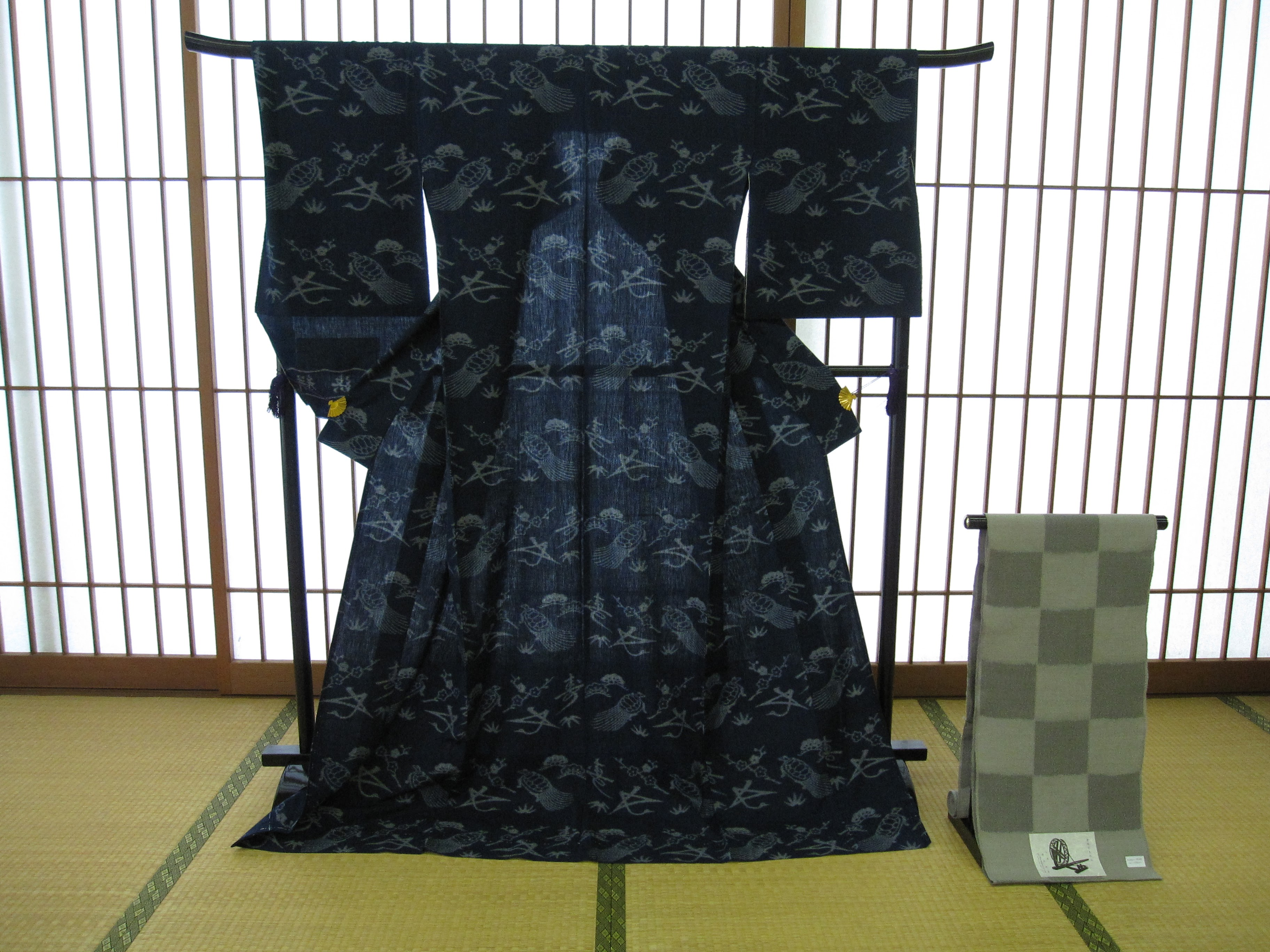 弓浜絣、アジア博物館井上靖記念館（鳥取県米子市）の特別展で撮影